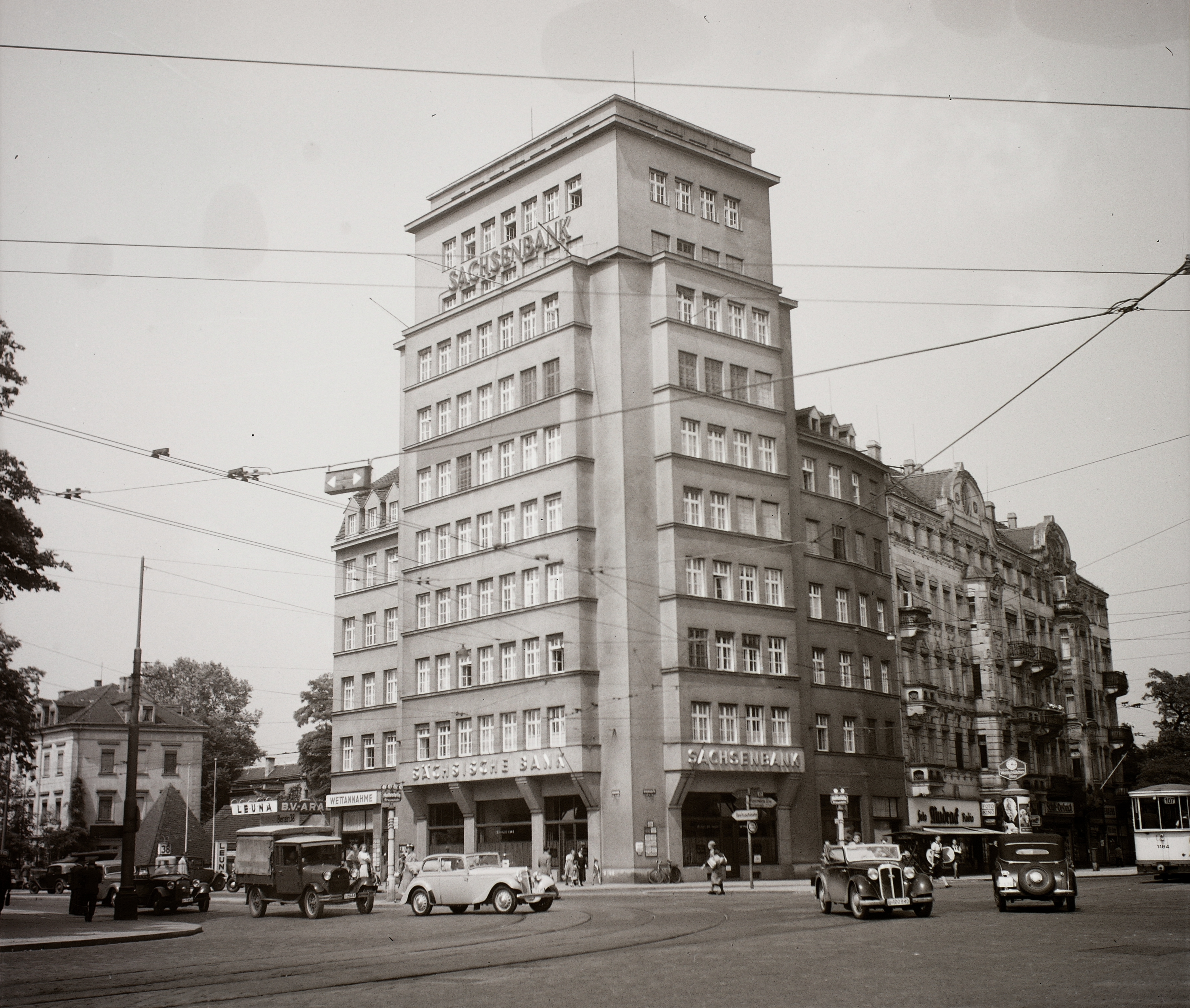 Albertplatz, Paulickhochhaus. (Dresden, Germmany) Location: Germany, Dresden Tags: street view, traffic, automobile, commercial vehicle, neon sign Title: Albertplatz, Paulickhochhaus. (Dresden, Germmany)